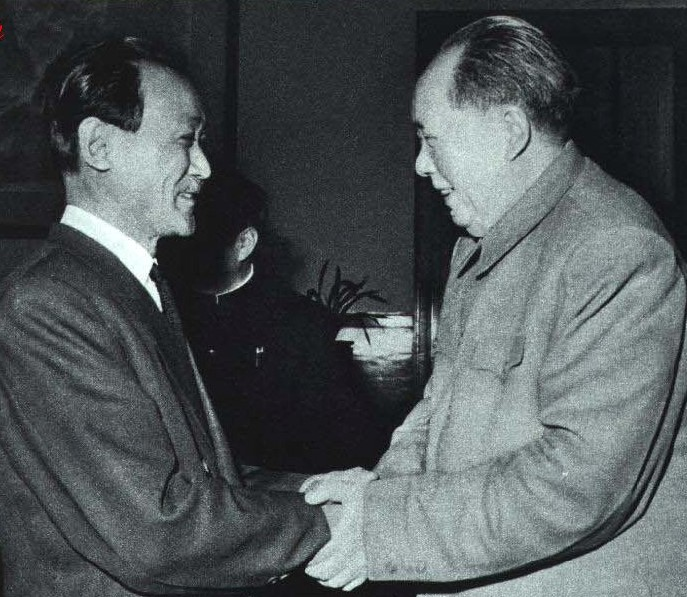 1964-06 1964年 日本共产党主席袴田里见访问中国与毛泽东